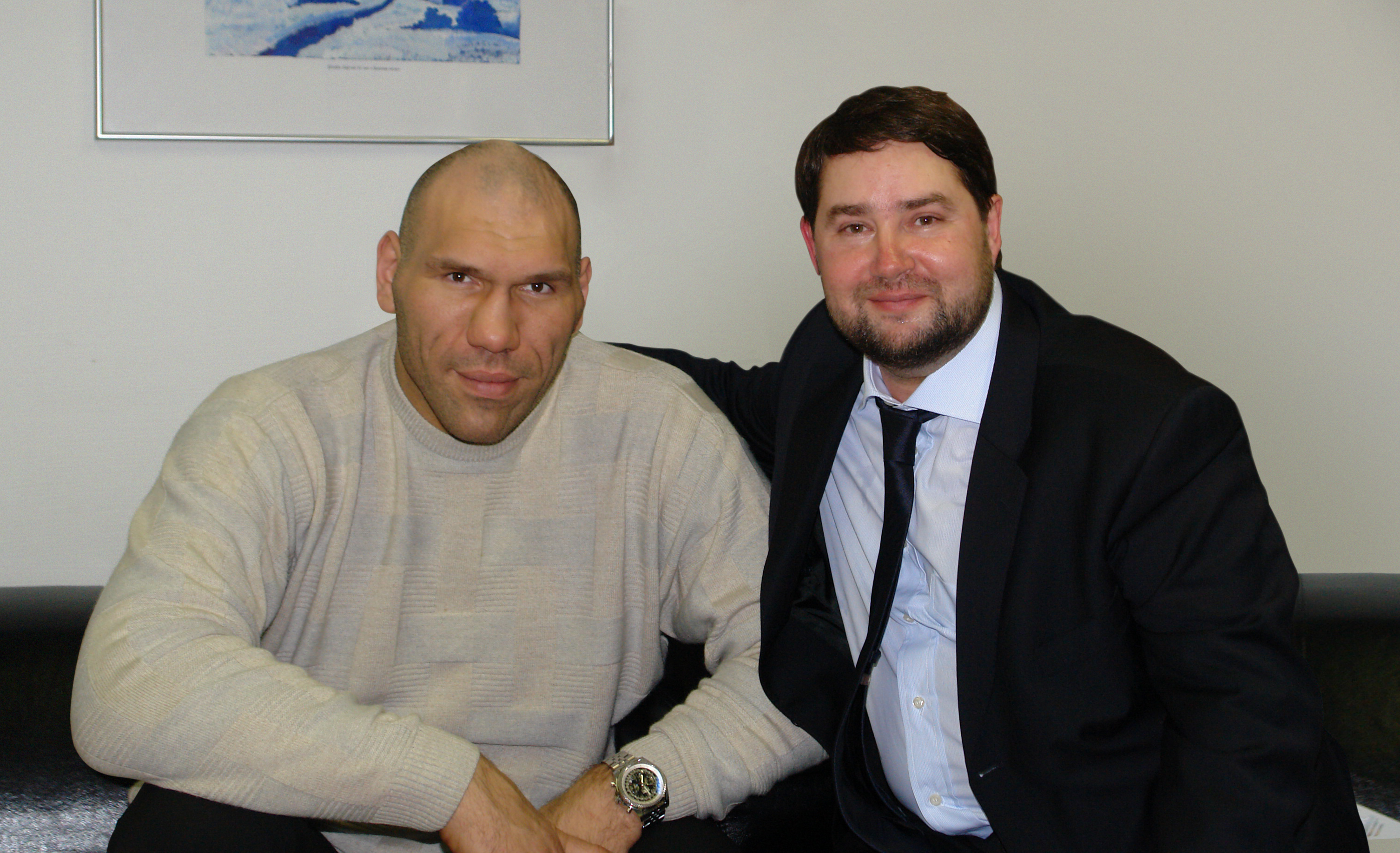 Игорь Никитин и Николай Валуев